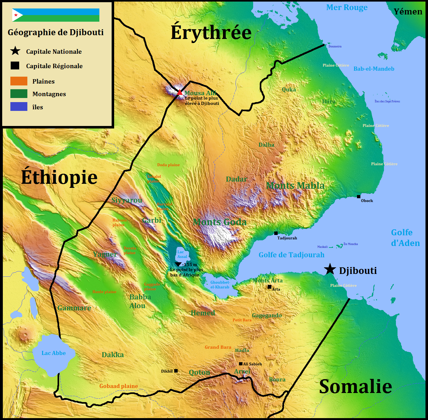 Géographie de Djibouti